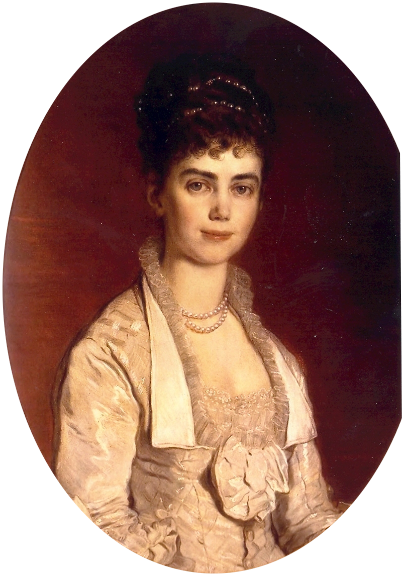 Prinzessin Thyra von Dänemark (1853−1933), Herzogin von Schleswig-Holstein-Sonderburg und Glücksburg